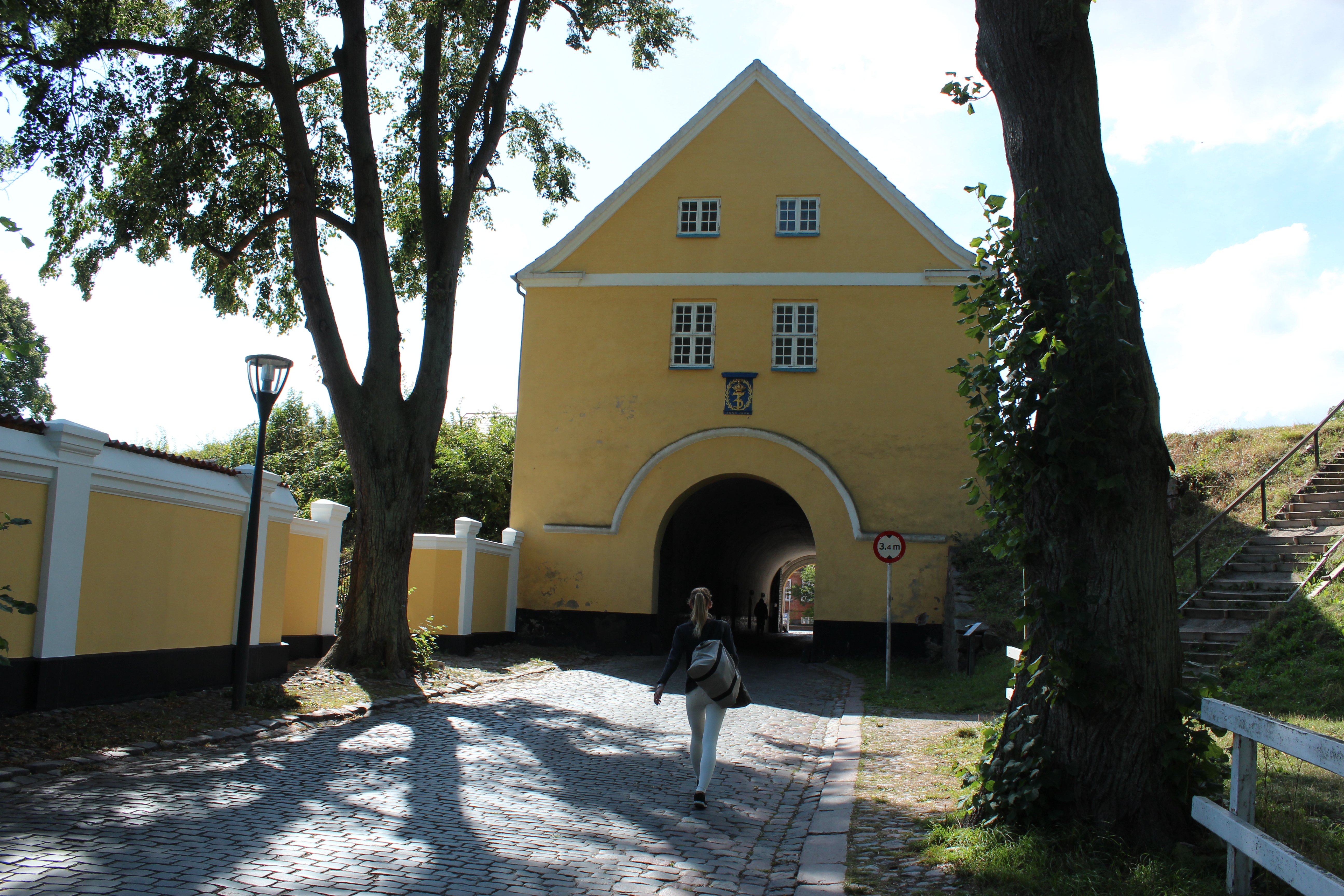 Landporten i Nyborg